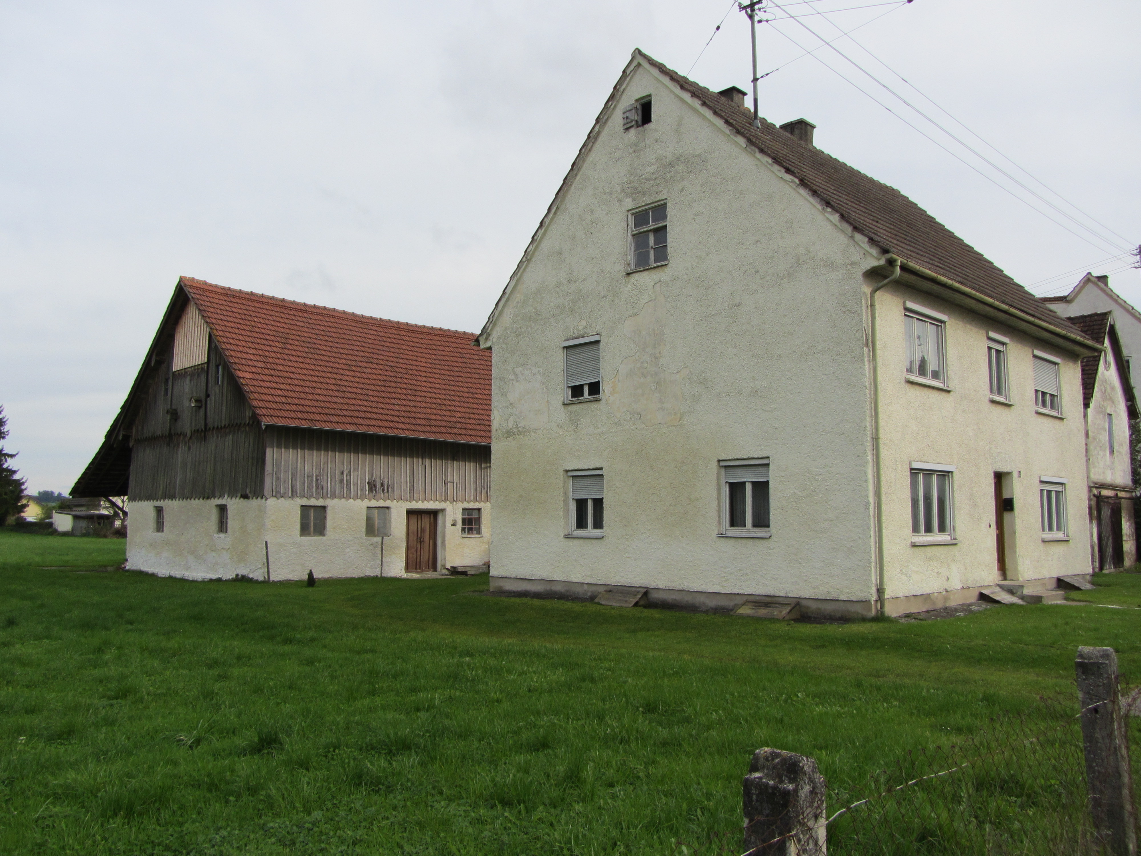 Metzgerei Bacharach (Fellheim) -Koschere Metzgerei